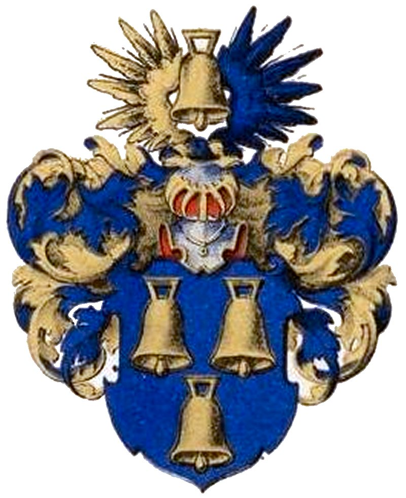 Bruemmeri suguvõsa aadlivapp.